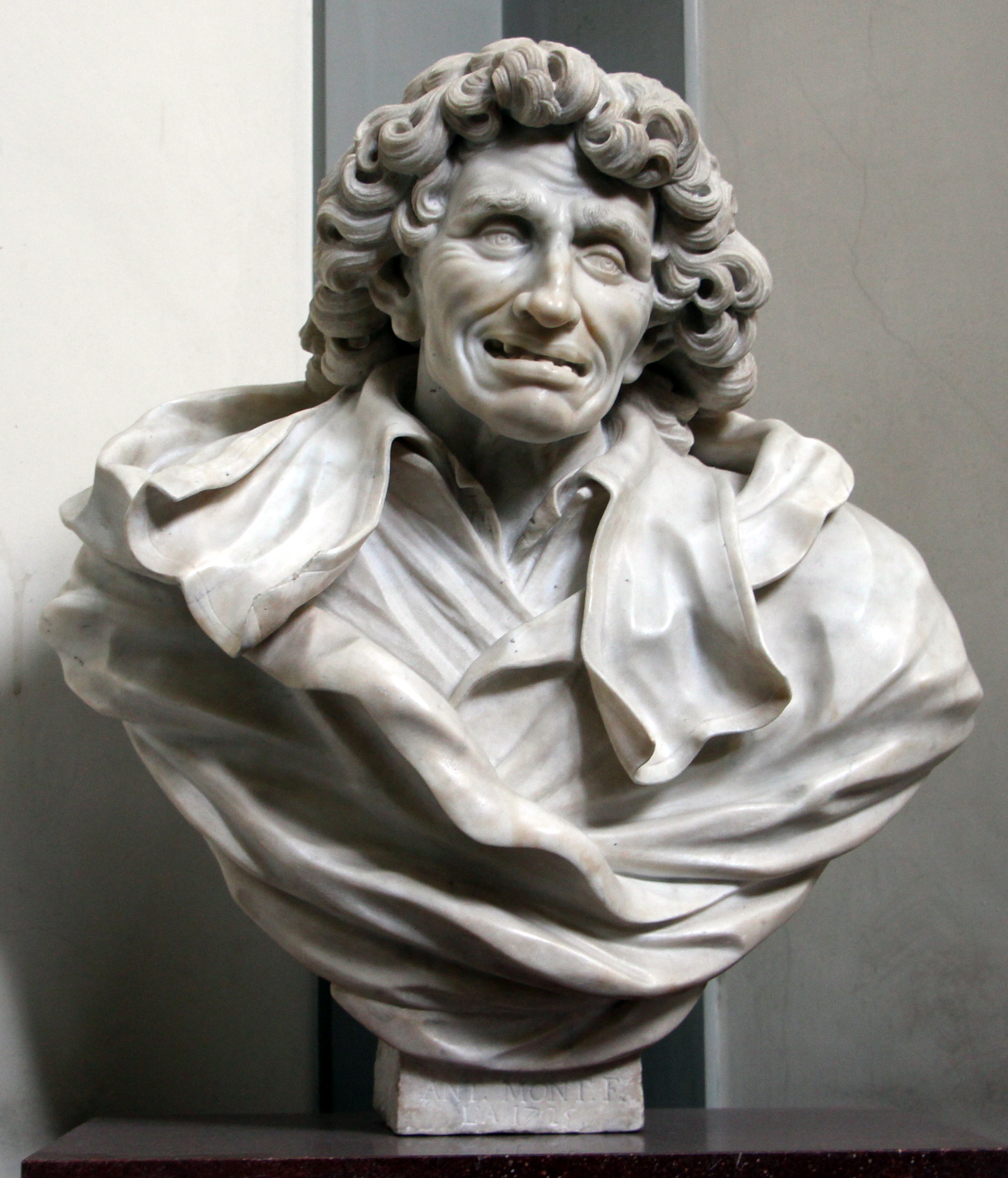 National Central Library of Florence